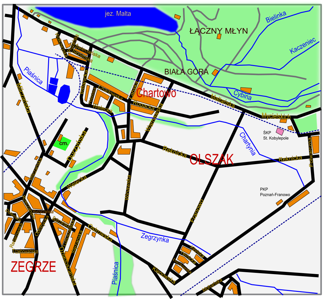 Mapa Poznań Chartowo, Olszak, Franowo, Zegrze, Malta 1948